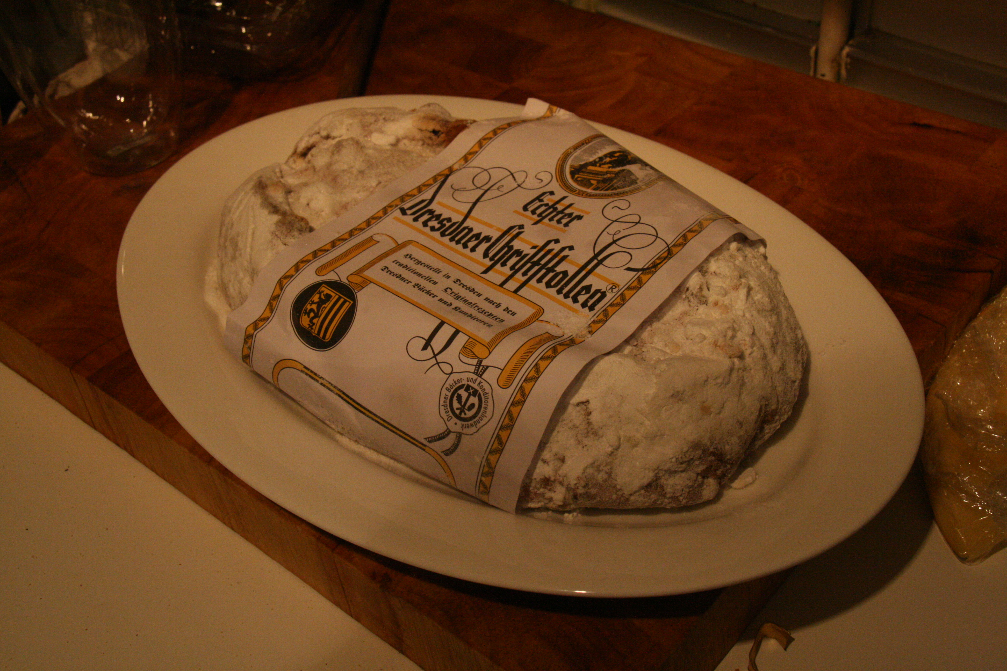 Christstollen